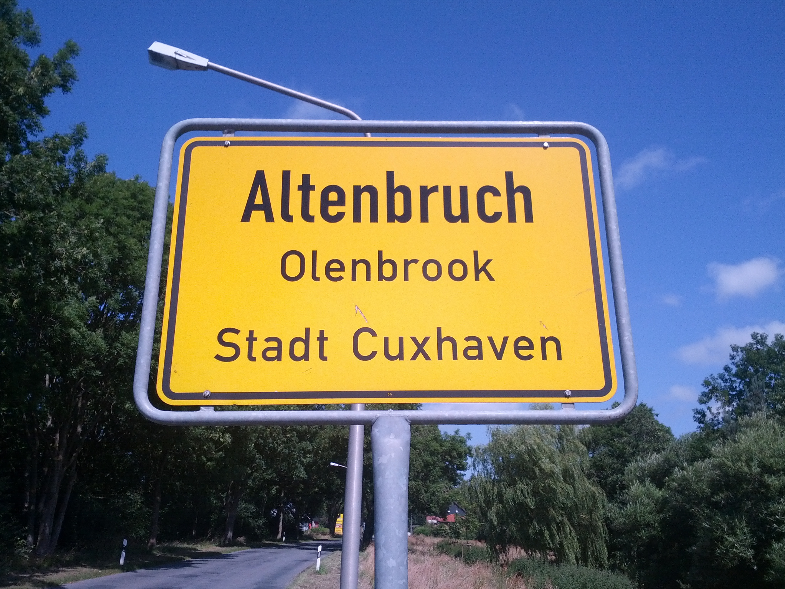 Oortsschild von Olenbrook, Landkreis Cuxhoben, mit den Naam op Hoochdüütsch un op Plattdüütsch